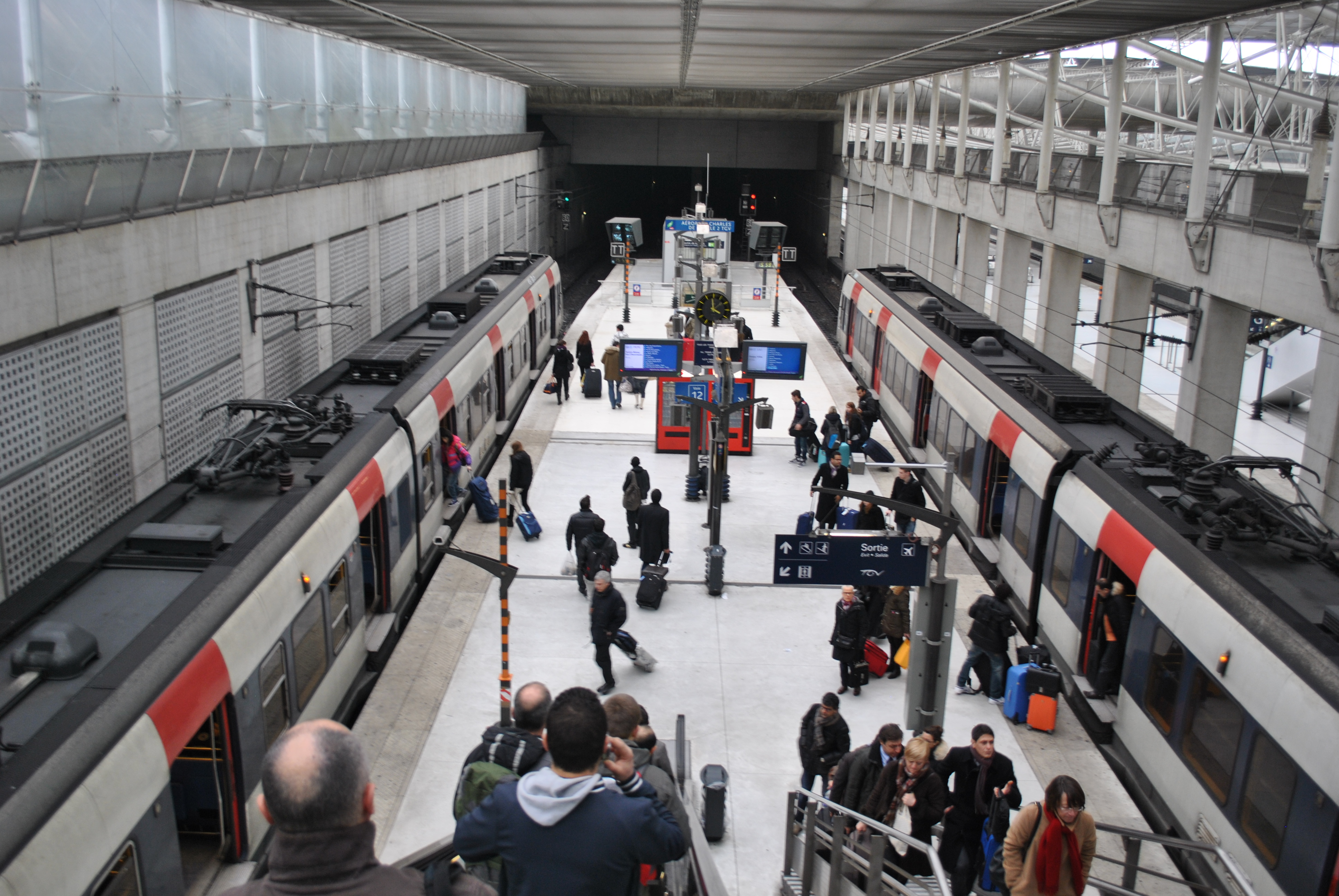 Estación RER B del Aeropuerto París-Charles de Gaulle.